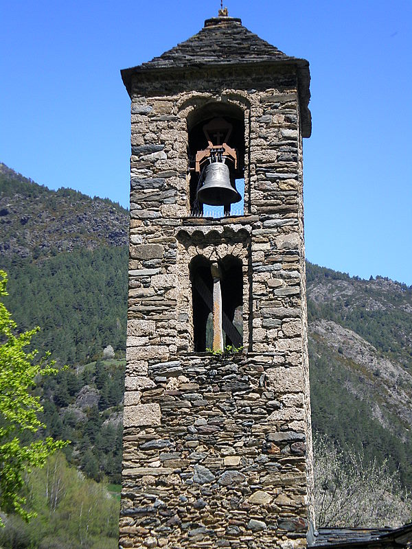 Església de Sant Martí de la Cortinada